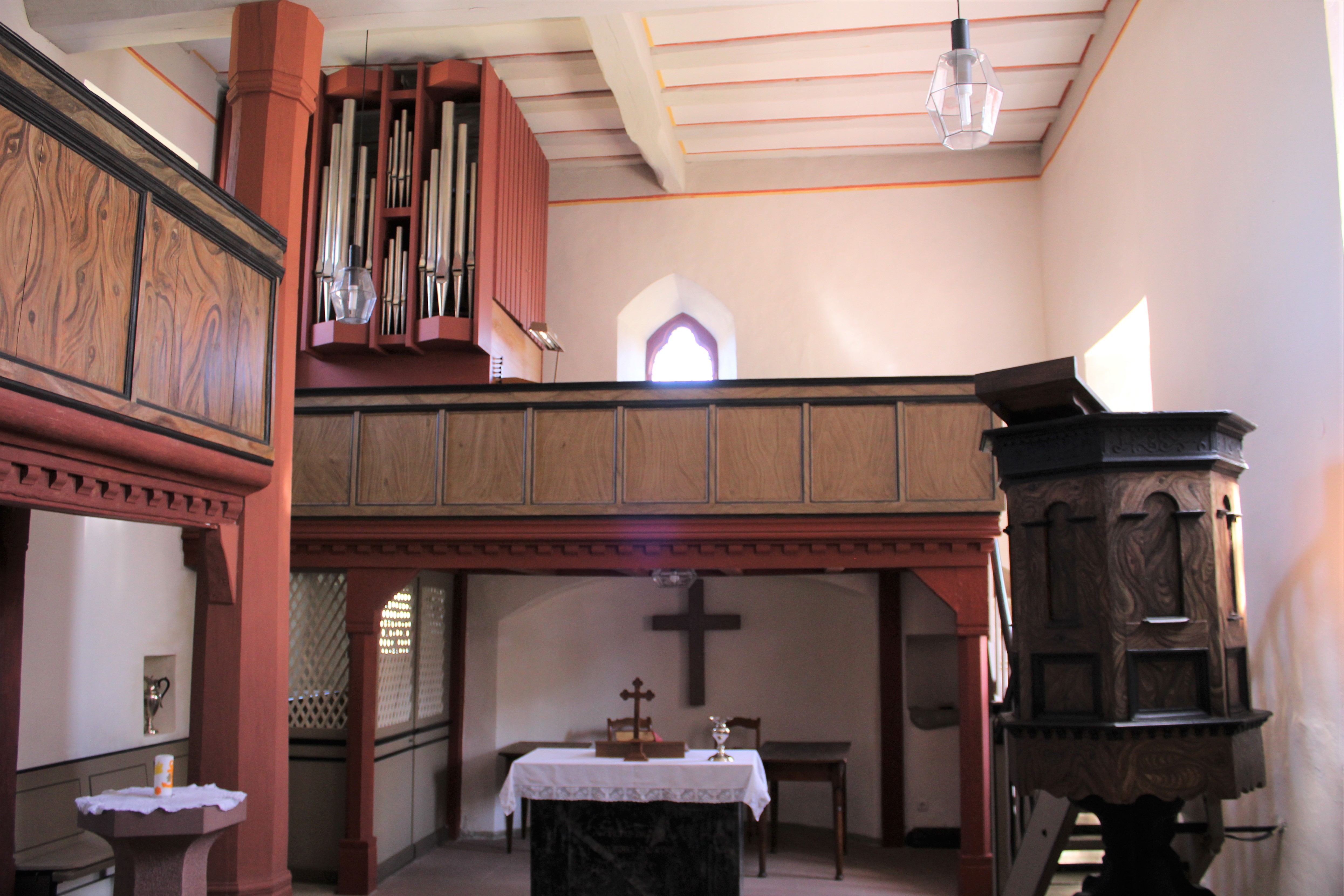 Evangelische Kirche Kraftsolms, Gemeinde Waldsolms, Hessen, Deutschland